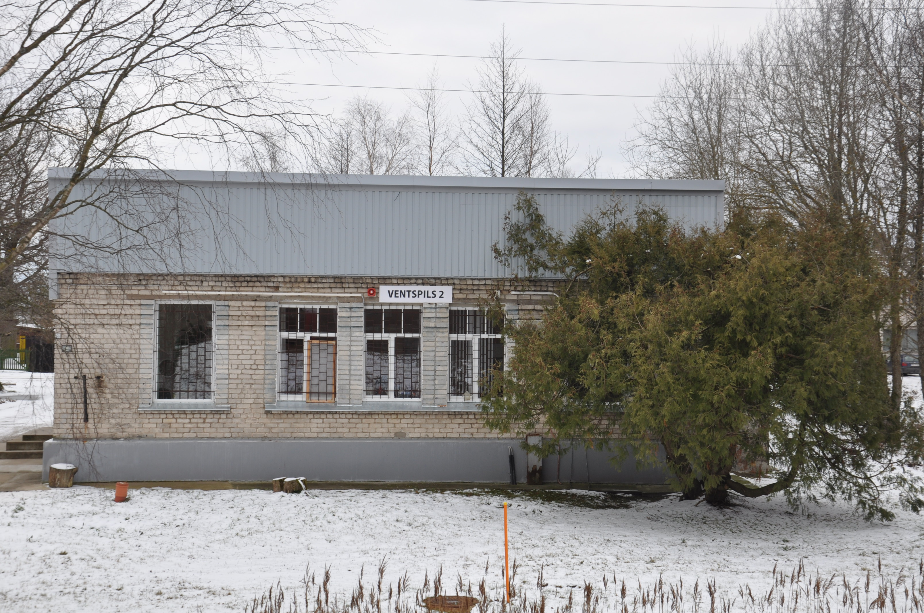 Пассажирское здание станции Вентспилс II